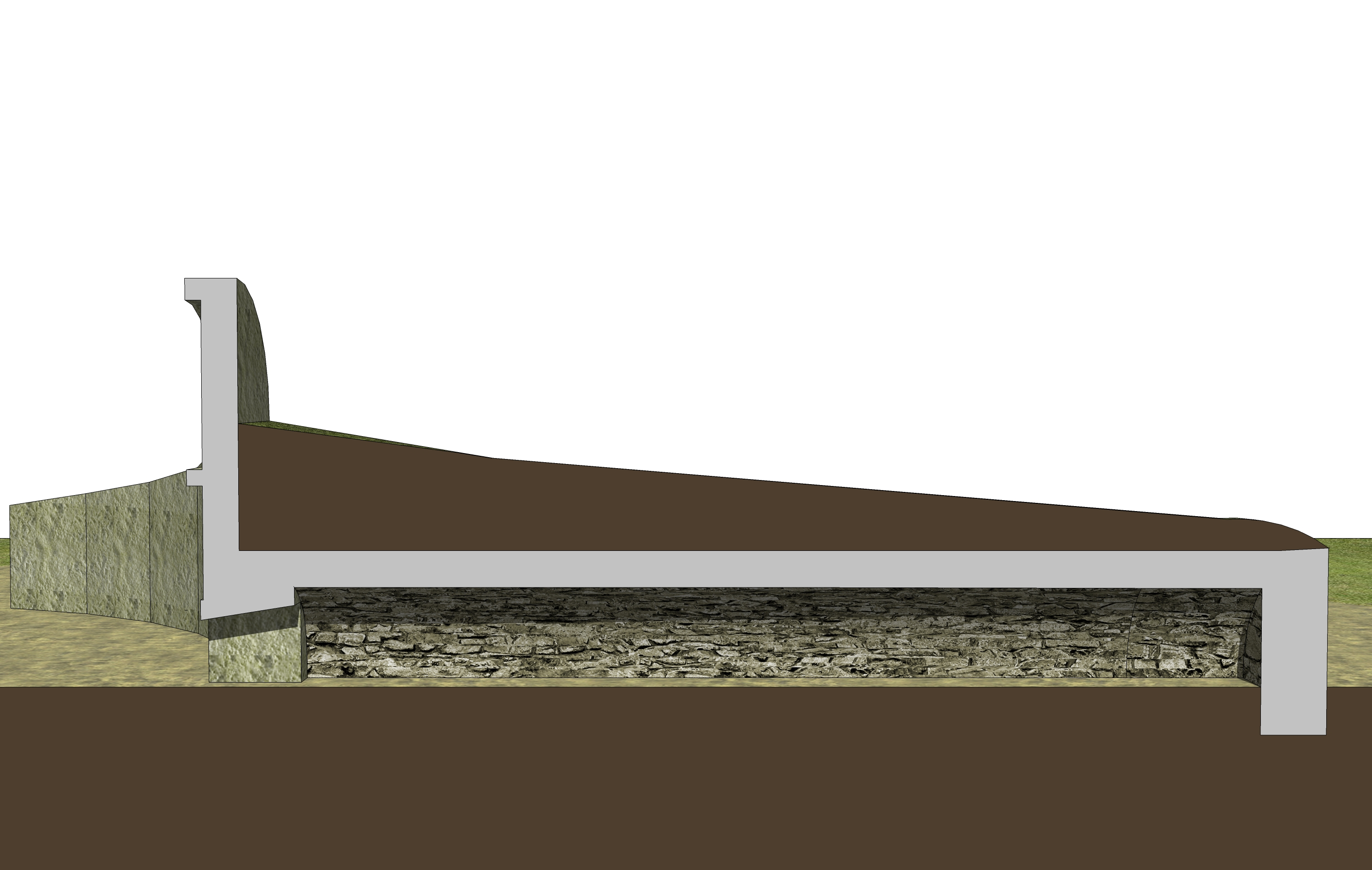 Modello 3D della tipologia di Tomba dei Giganti ad esedra con arco centinato (sezione).